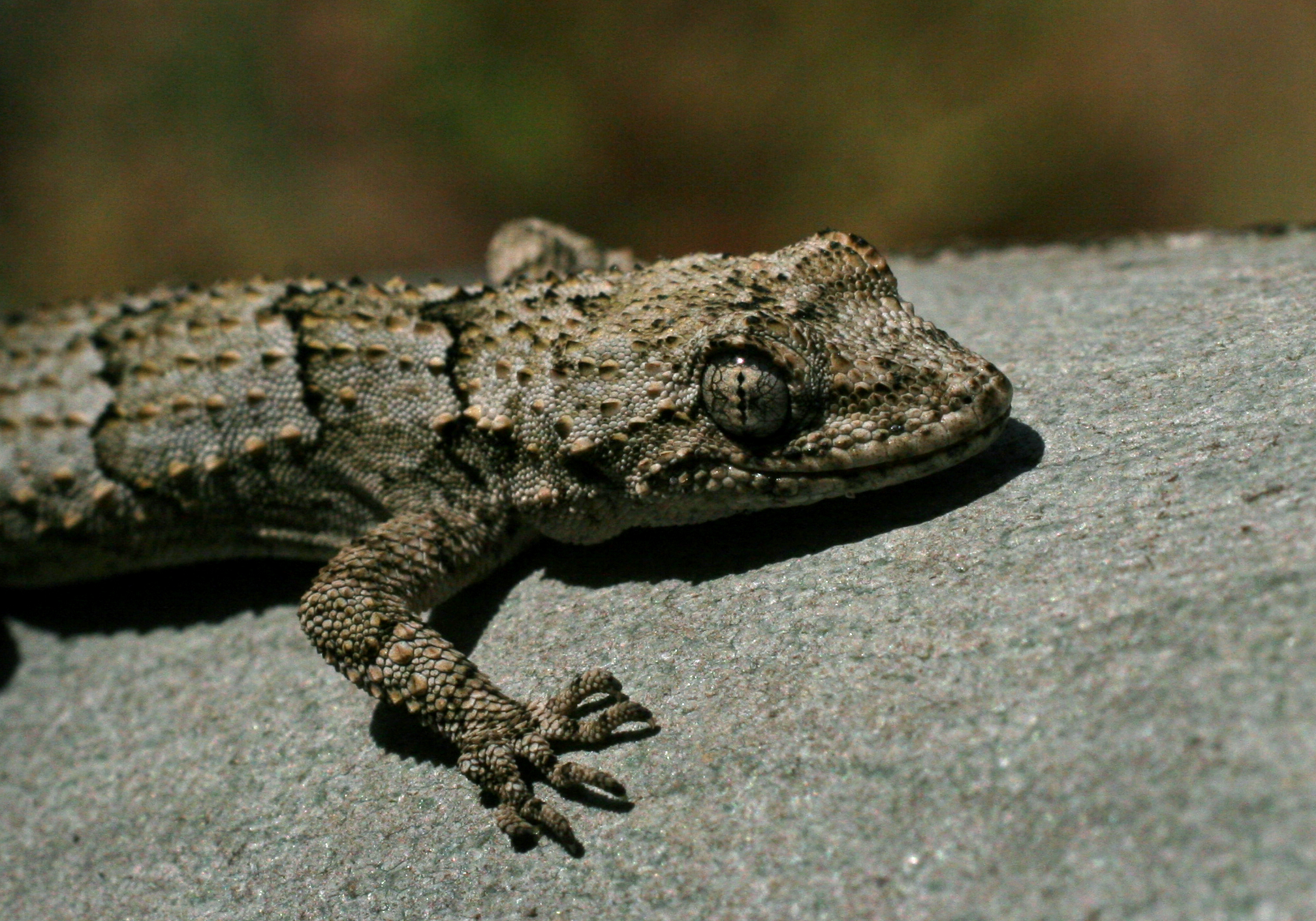 שממית עצים (Cyrtodactylus kotschyi)